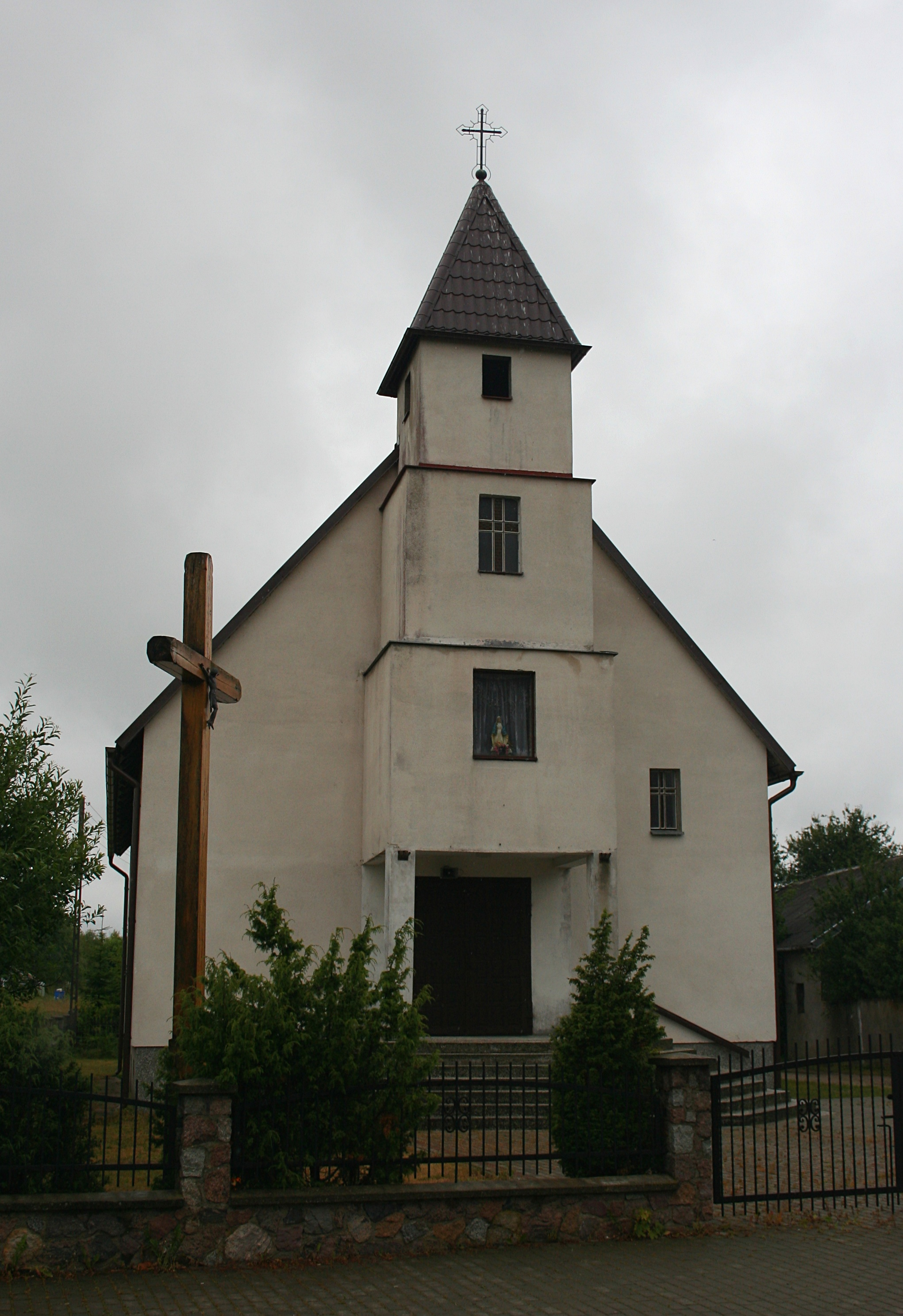 Węsiory - kościół filialny pw. MB Królowej Różańca Świętego, przynależny do parafii Trójcy św. w Sulęczynie